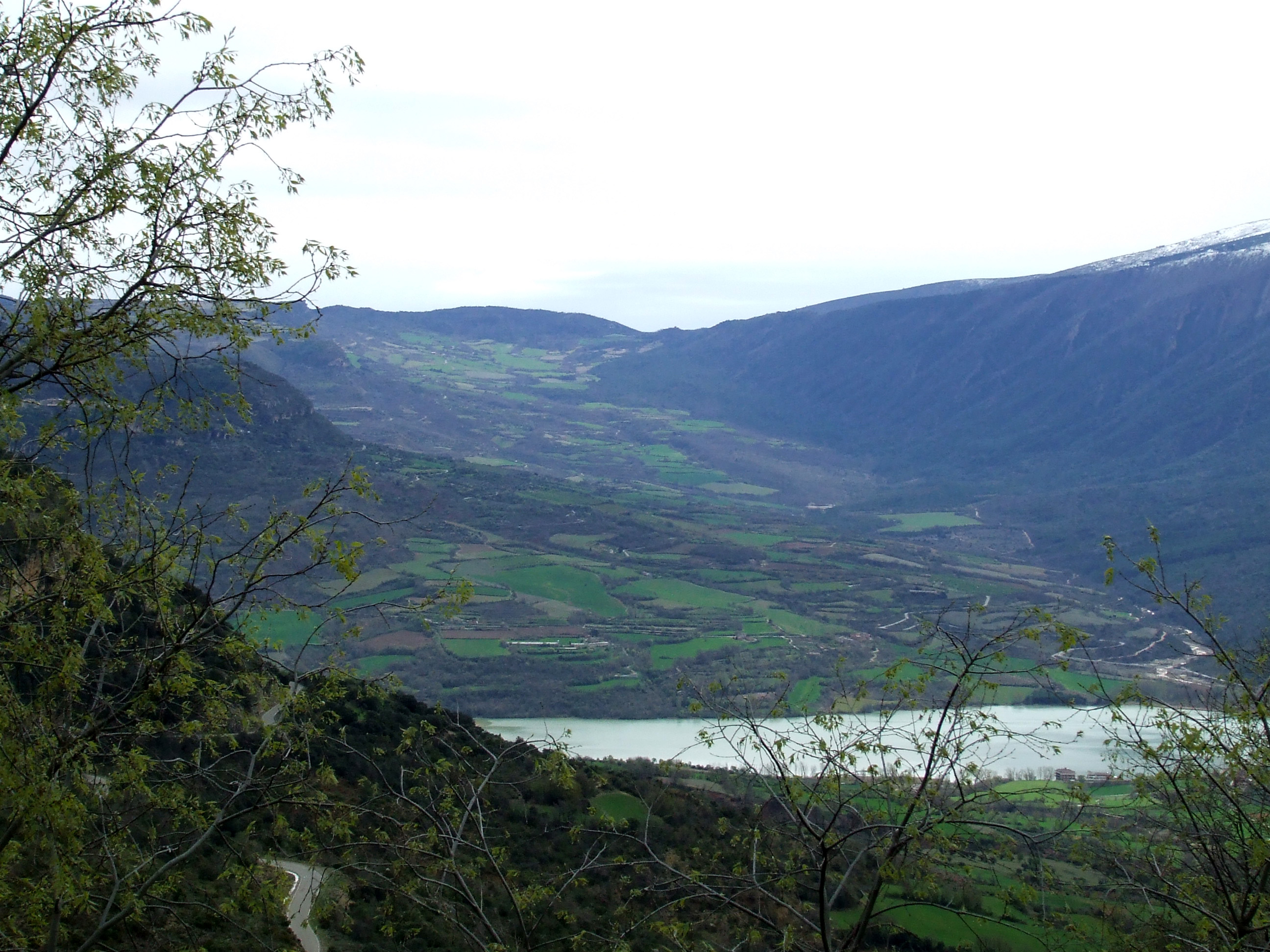 La vall de Barcedana (Llimiana i Gavet de la Conca, Pallars Jussà)